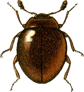 This file has been extracted from another file: Jacobs23.jpg